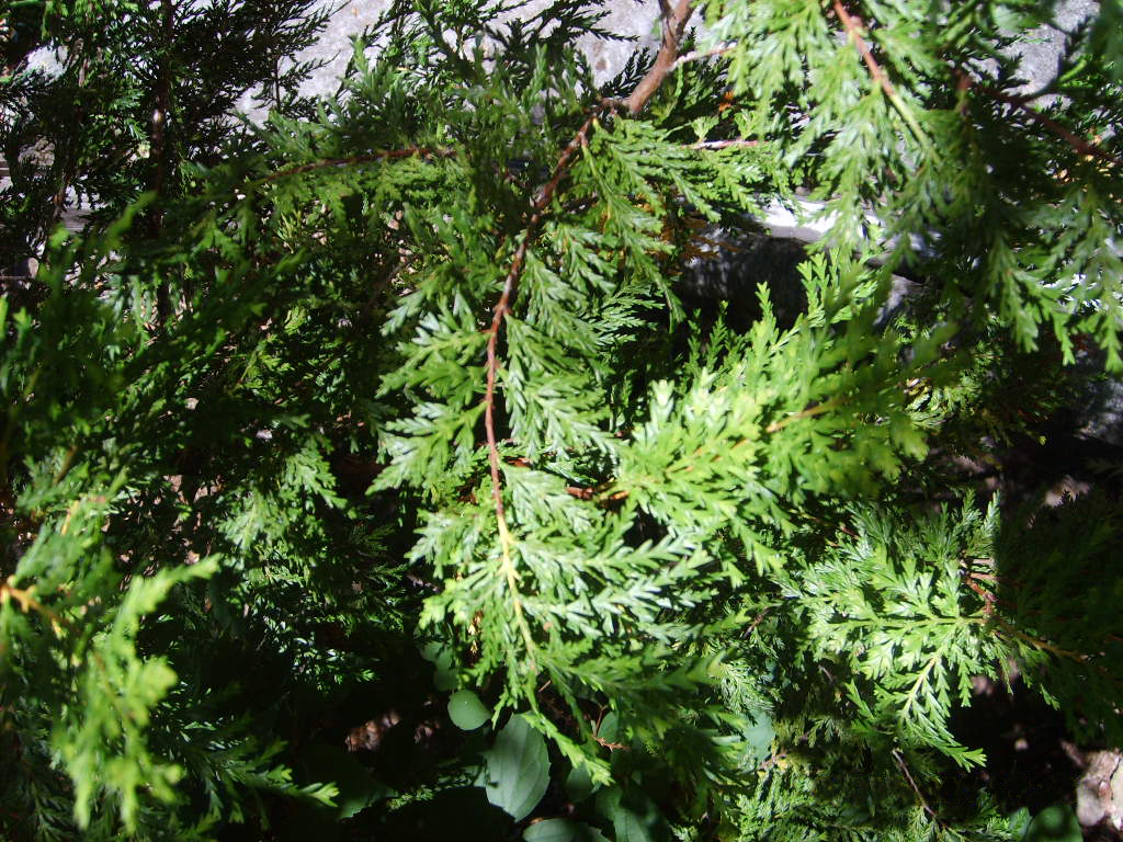 Ciprés de Cordillera (Austrocedrus chilensis)